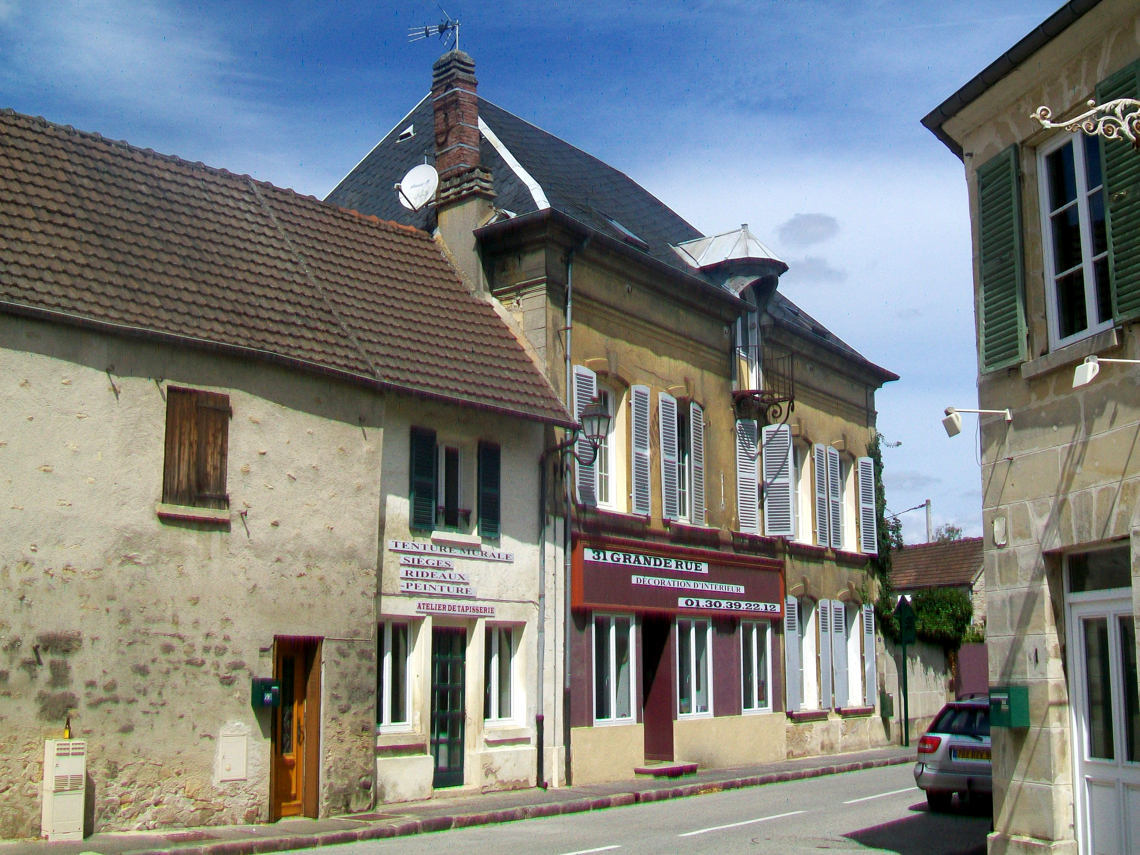 Sur la Grande-Rue.